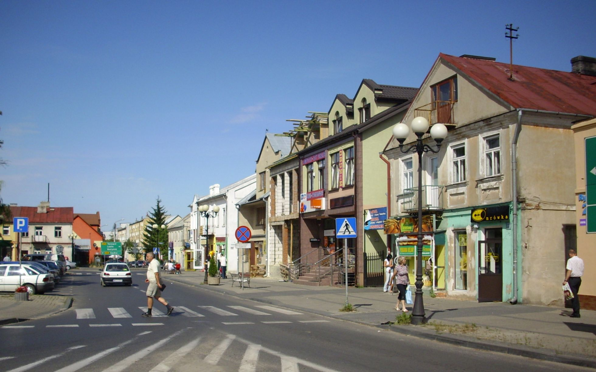 Łosice. Fragment rynku.